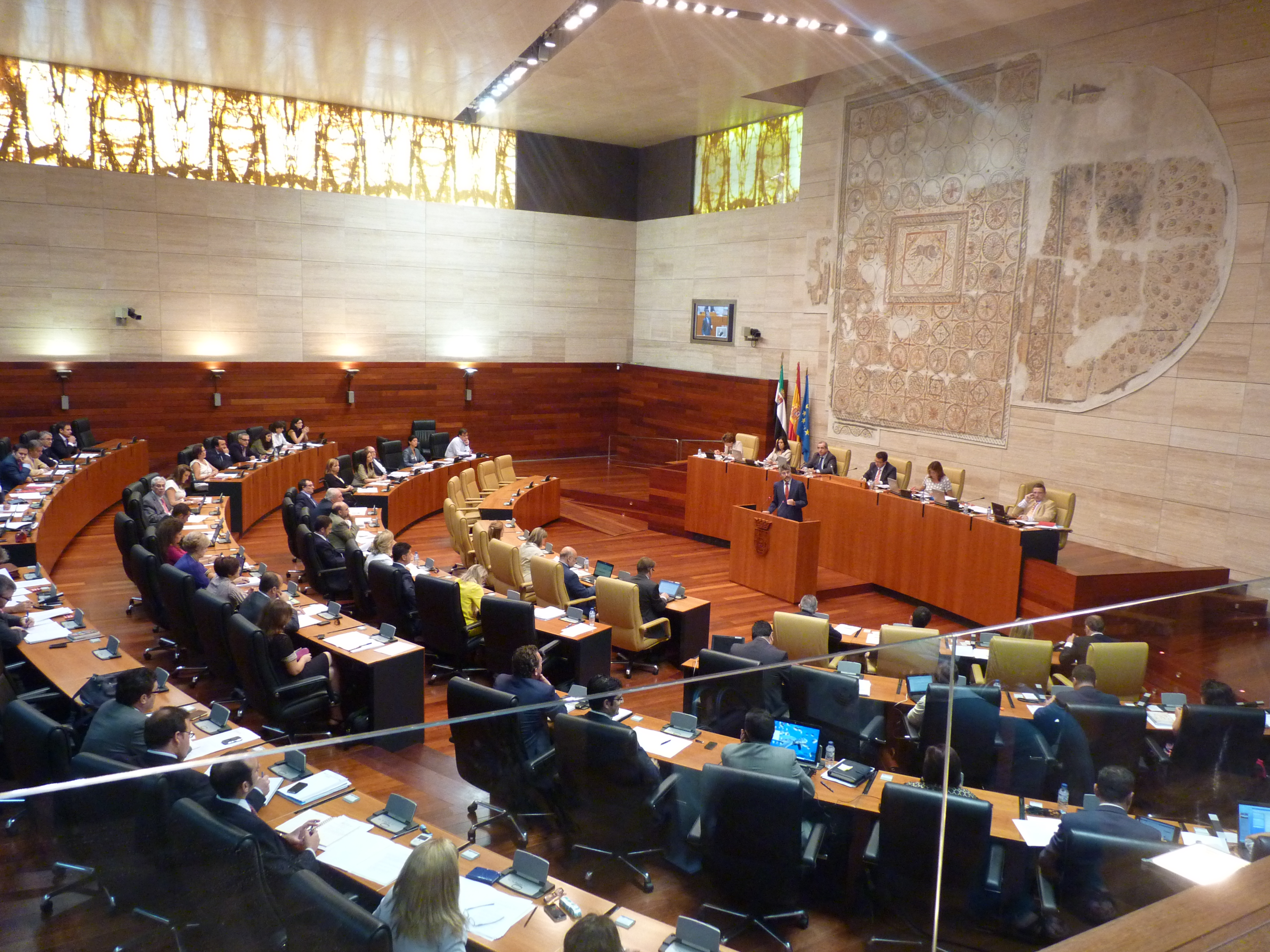 Pleno de la Asamblea de Extremadura